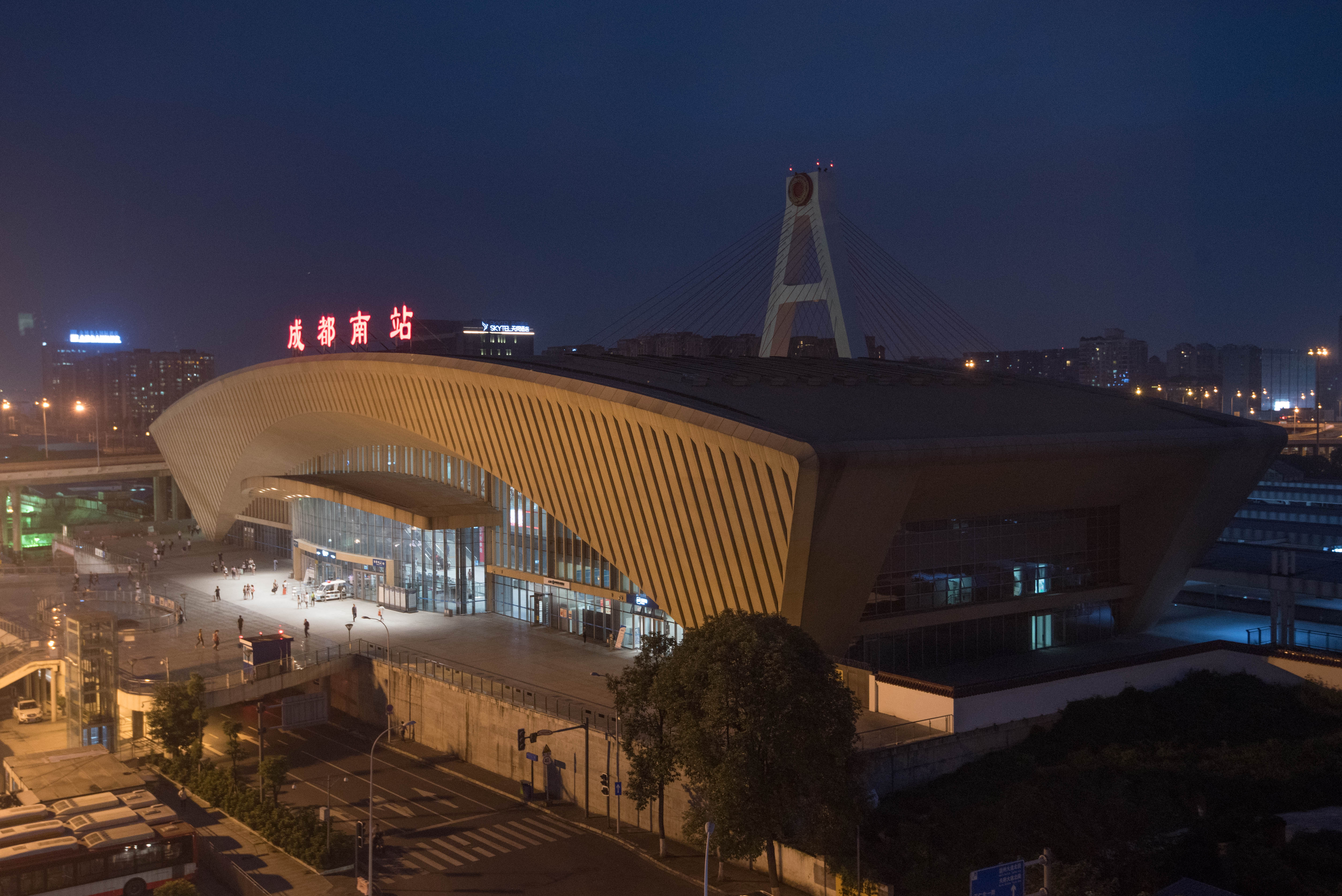 成都南站夜景